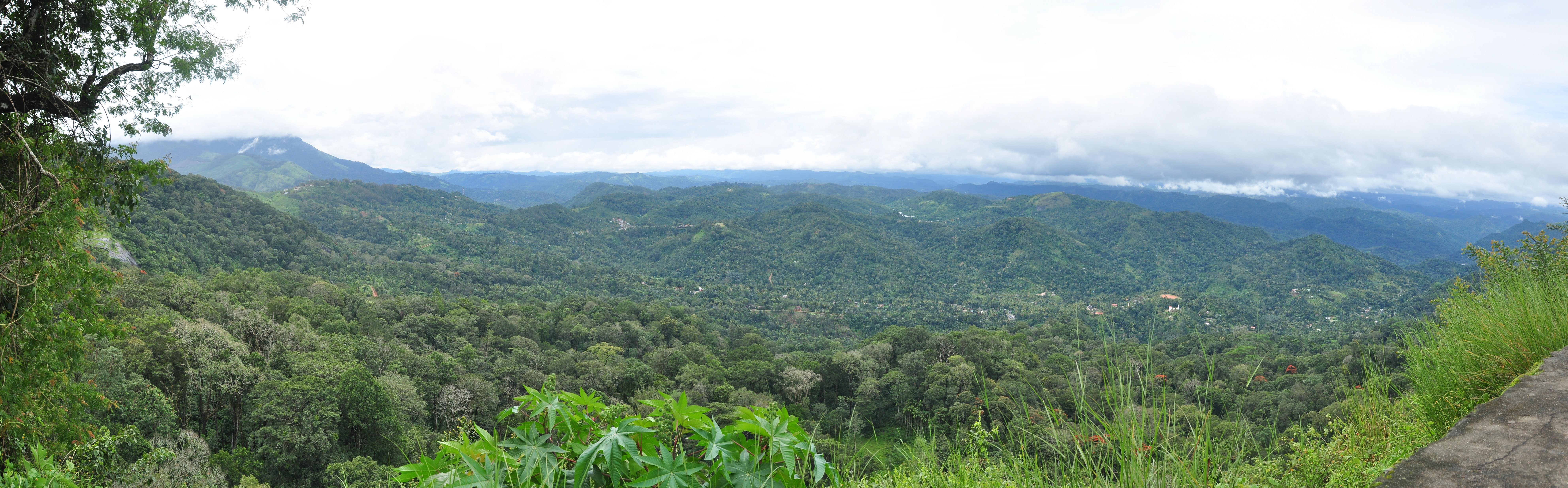 മുന്നാറിലെ മലകള്‍